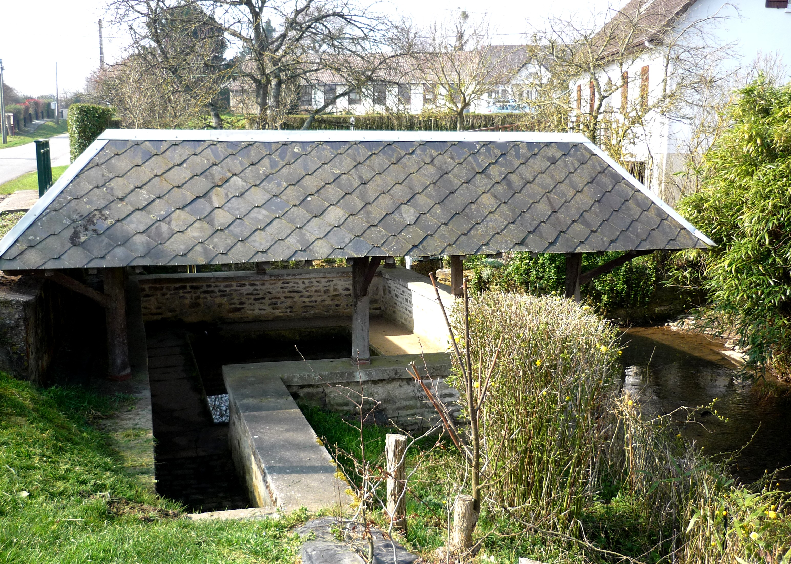 Lavoir sur la rivière le Bordel affluent de la Seulles à Tessel (Calvados)